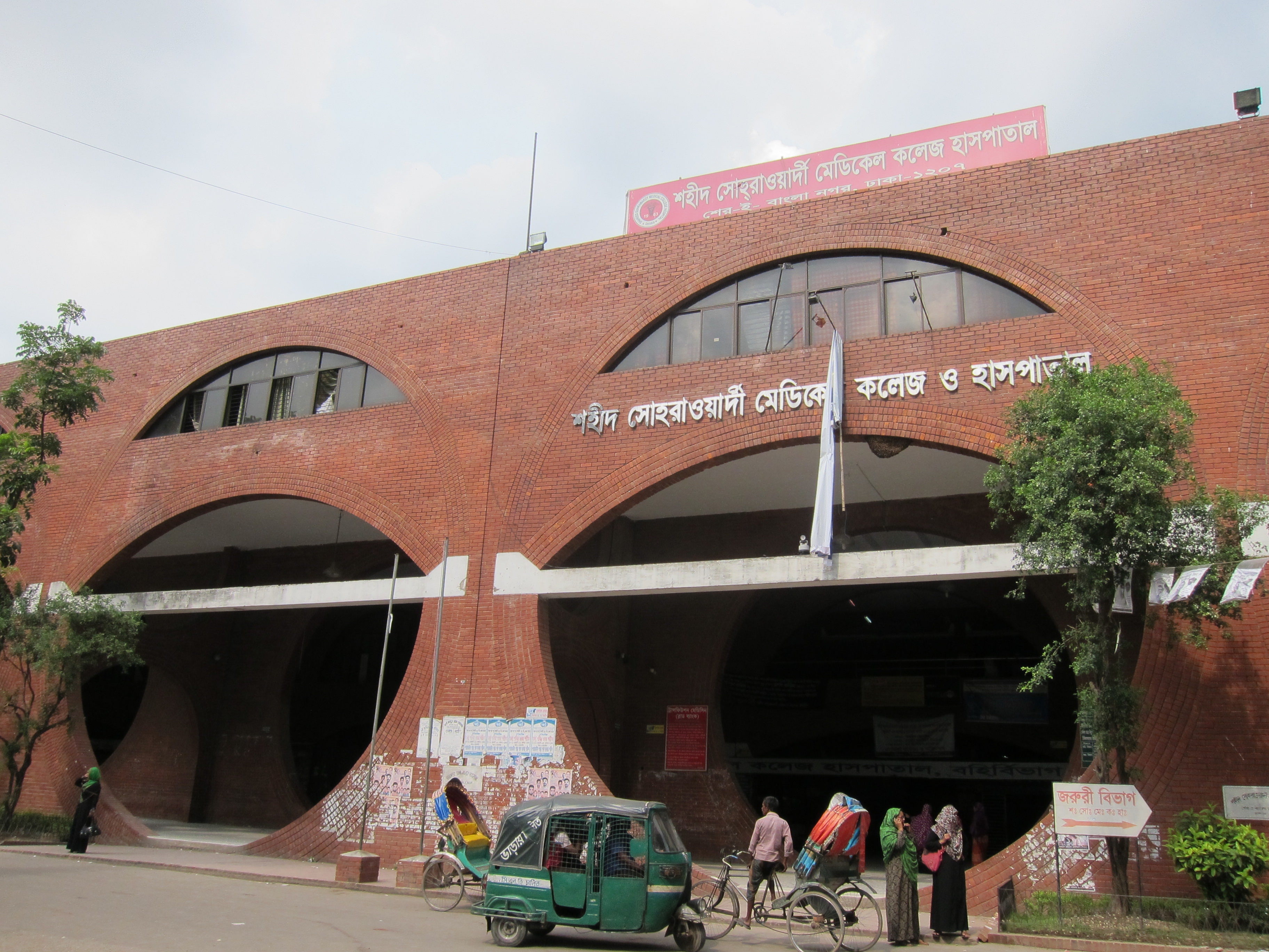 デザイナーズホスピタル。